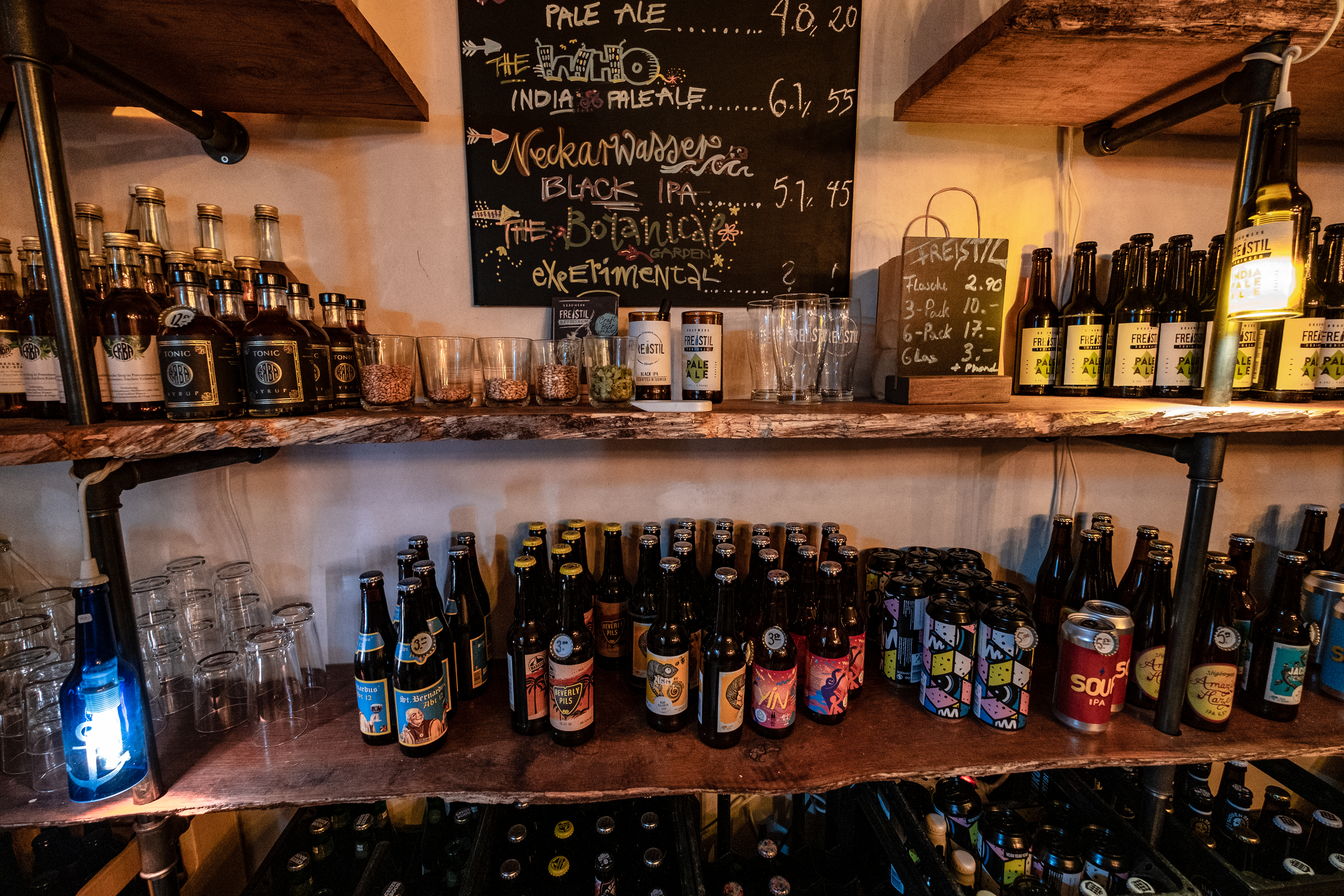 Bier-Regal im Brauwerk Freistil in Tübingen